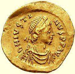 See File:Tremissis-Justin I-sb0058.jpg.